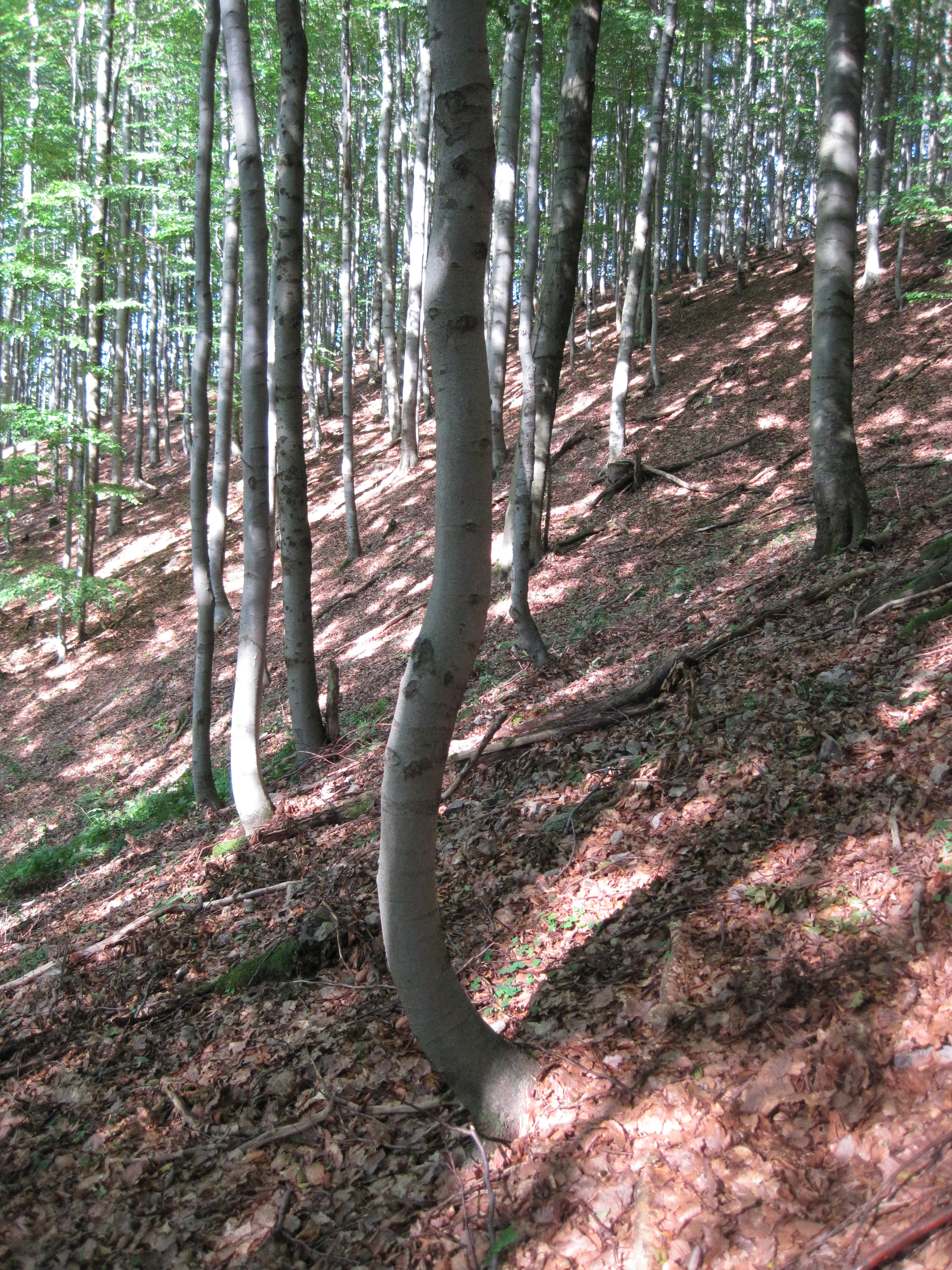 Talsperre Schönbrunn: Hangbewegung Gabel, Wuchsformen der Hangbäume